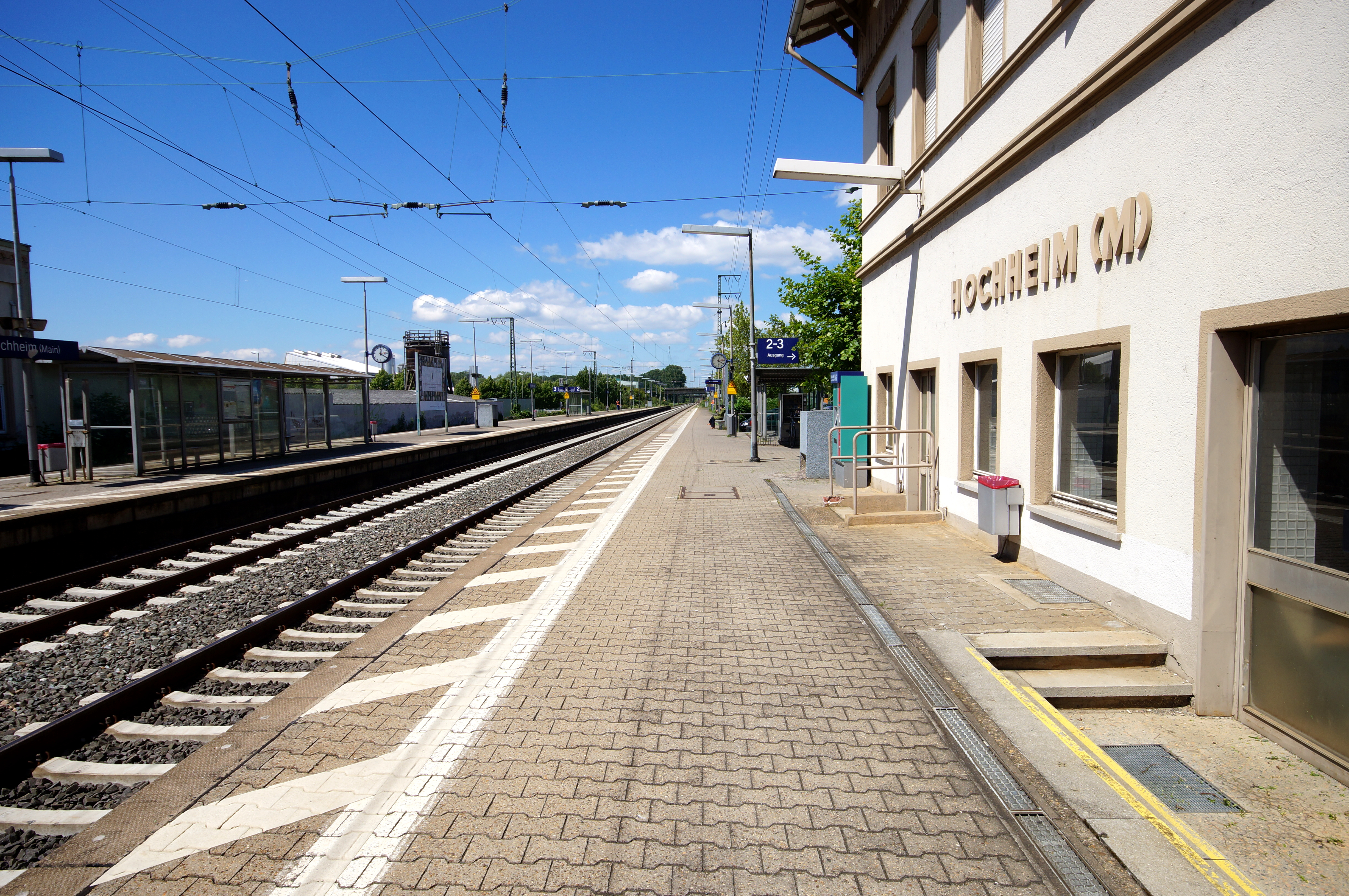 Der Bahnsteig zu Gleis 1 des Bahnhofs Hochheim (Main)